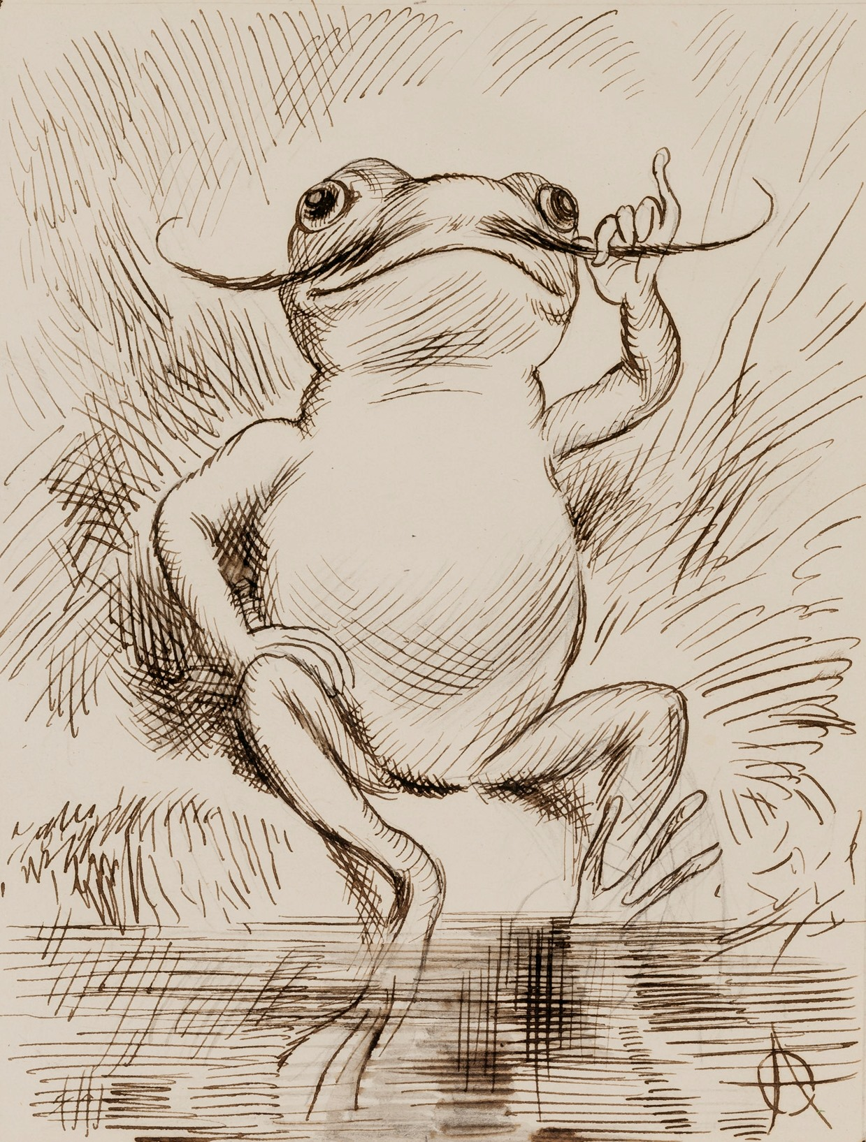 Adolf Oberländer: Der Laubfrosch Feder in Tusche auf Papier 14 x 10,5 cm Rechts unten monogrammiert